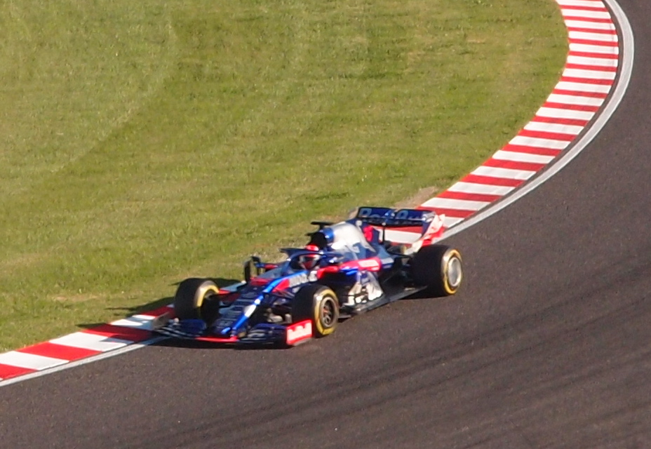 2019年日本グランプリSTR14